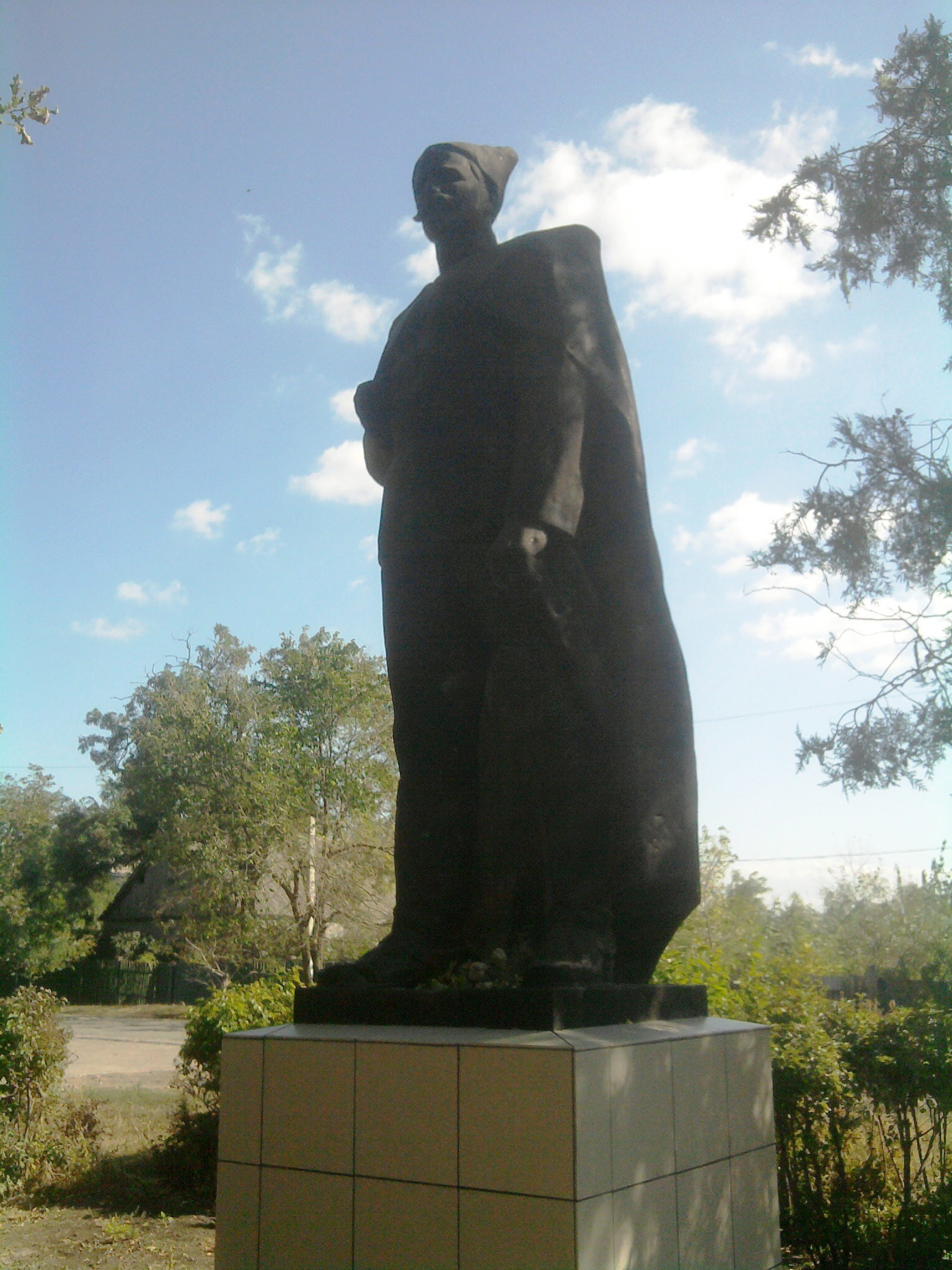 Пам’ятник В.І.Чапаєву біля будівлі сільради села Саф'яни, Ізмаїльський район, Одеська область